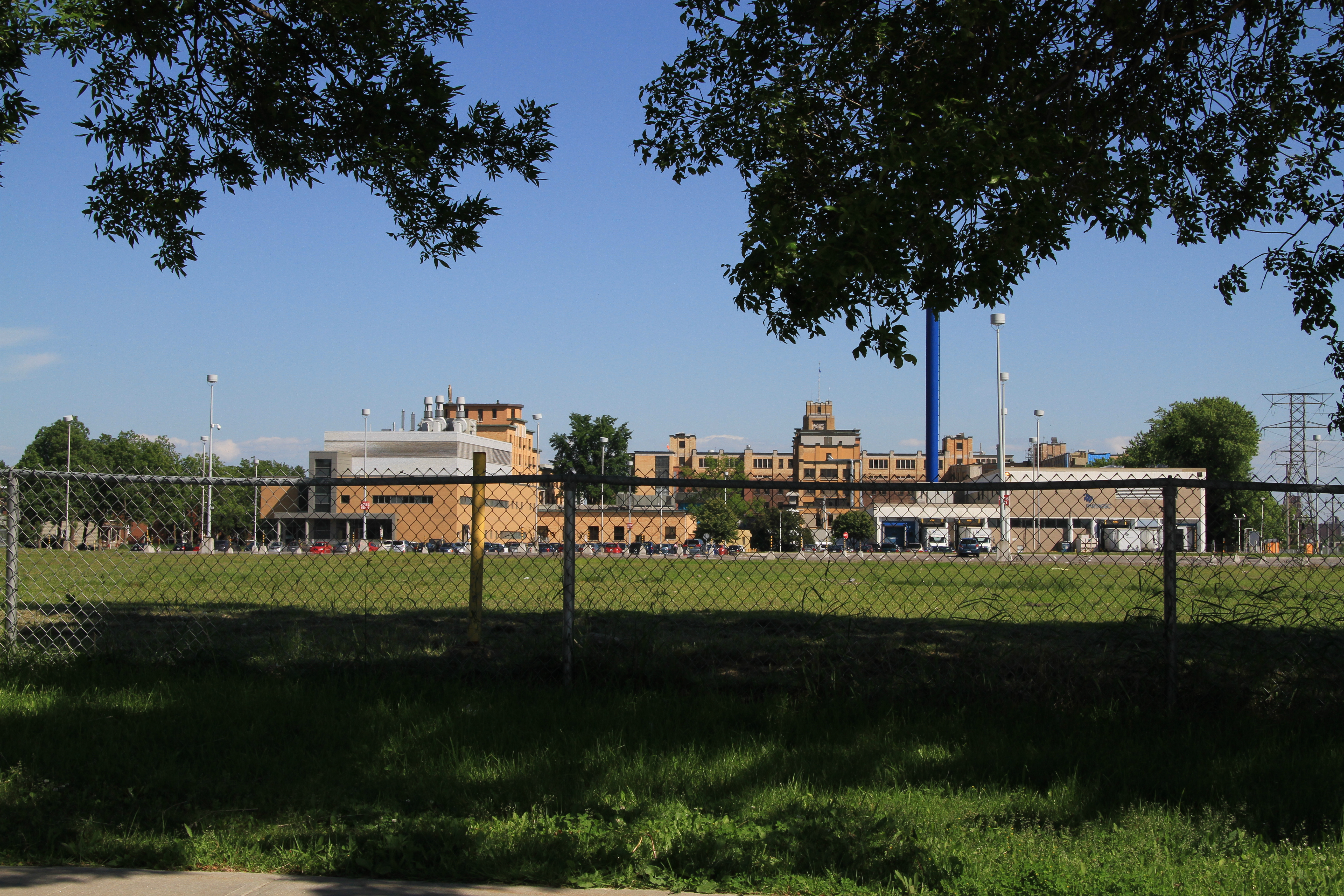 Photo de l'arrière de l'Hôpital de l'Enfant-Jésus dans l'arrondissement La Cité-Limoilou de la ville de Québec.